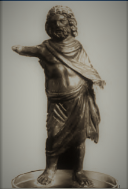 Jupiterstatue aus Orsingen, heute im Museum für Ur- und Frühgeschichte Freiburg